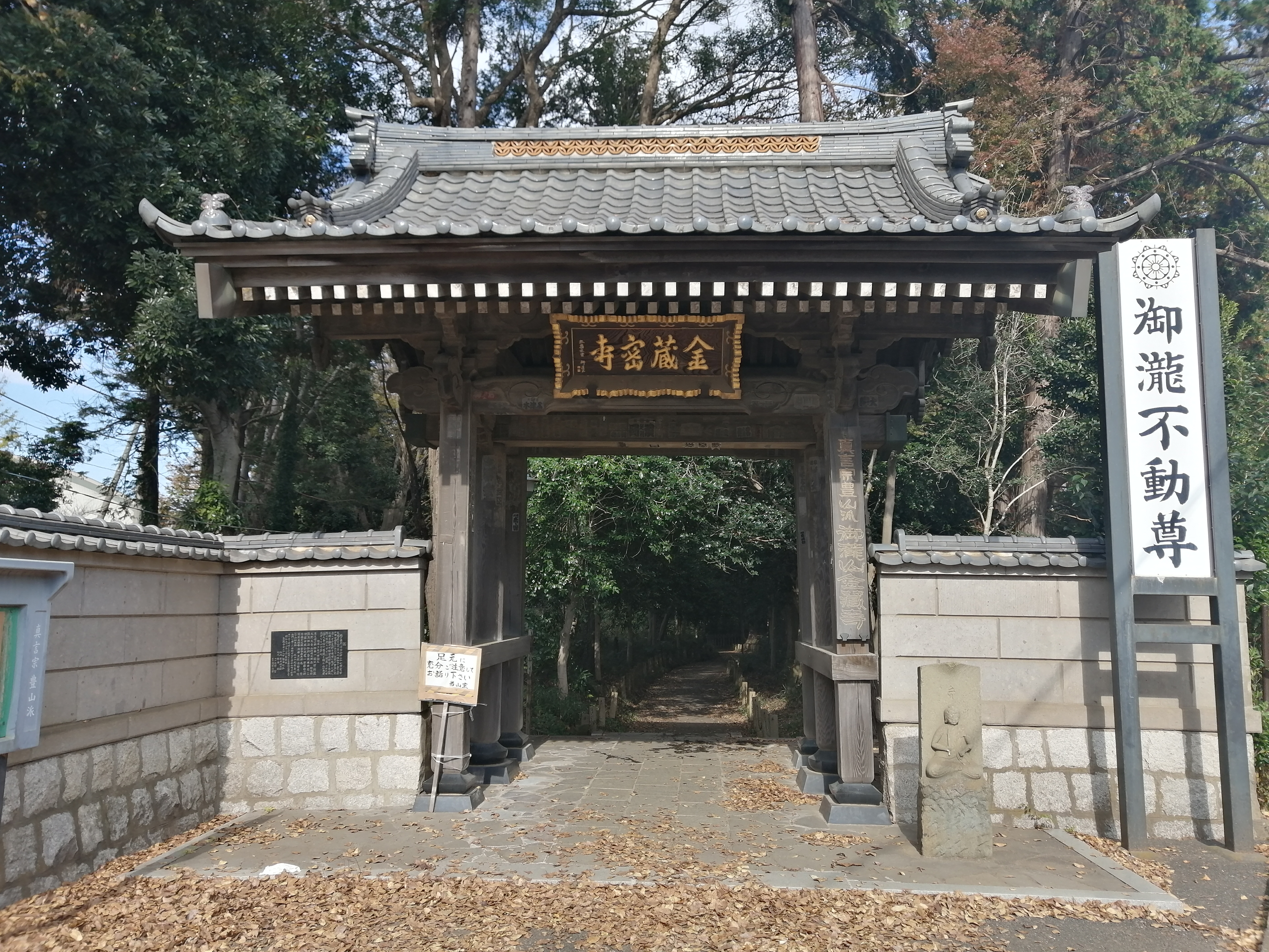 御滝不動尊金蔵寺（千葉県船橋市金杉）